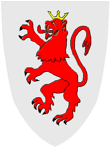 Stema „Scaunului Sebeșului” (în germană Stuhl Mühlbach, în maghiară Szászsebesszék), unitate administrativă a sașilor transilvăneni atestată documentar pentru prima oară în anul 1308, având din acest an sediul de reședință în localitatea Sebeș.